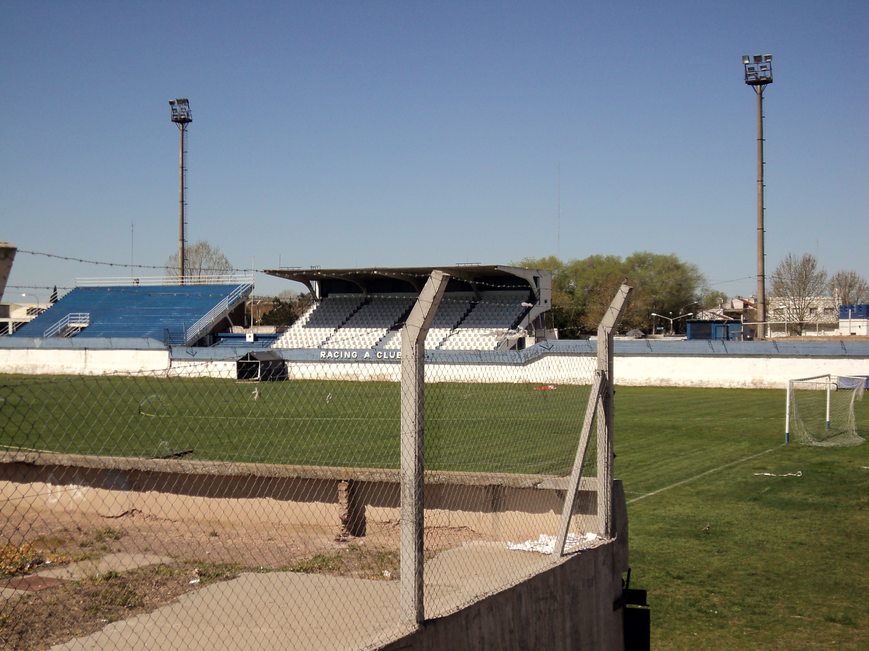 Estadio de Racing de Olavarria